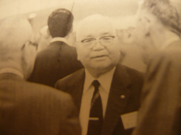 青木 大吉は、税理士、公認会計士。大日本帝国海軍の軍人。 等松・青木監査法人創立10周年記念パーティー（1978年10月）